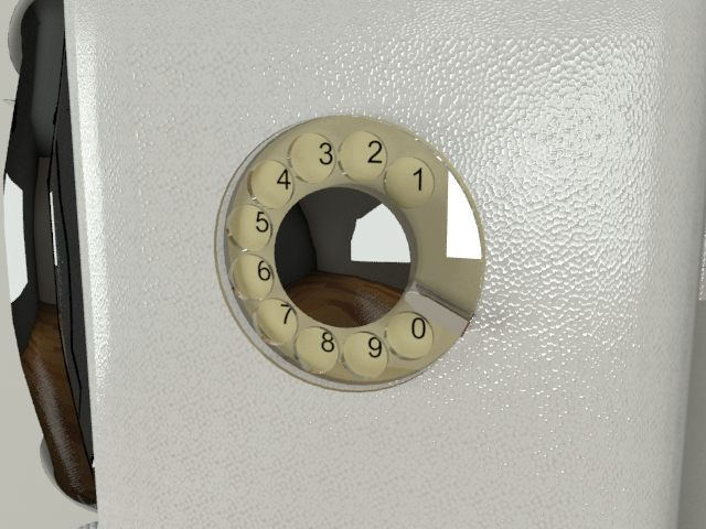 Таксофон АМТ-69, дисковый номеронабиратель (3d-модель).